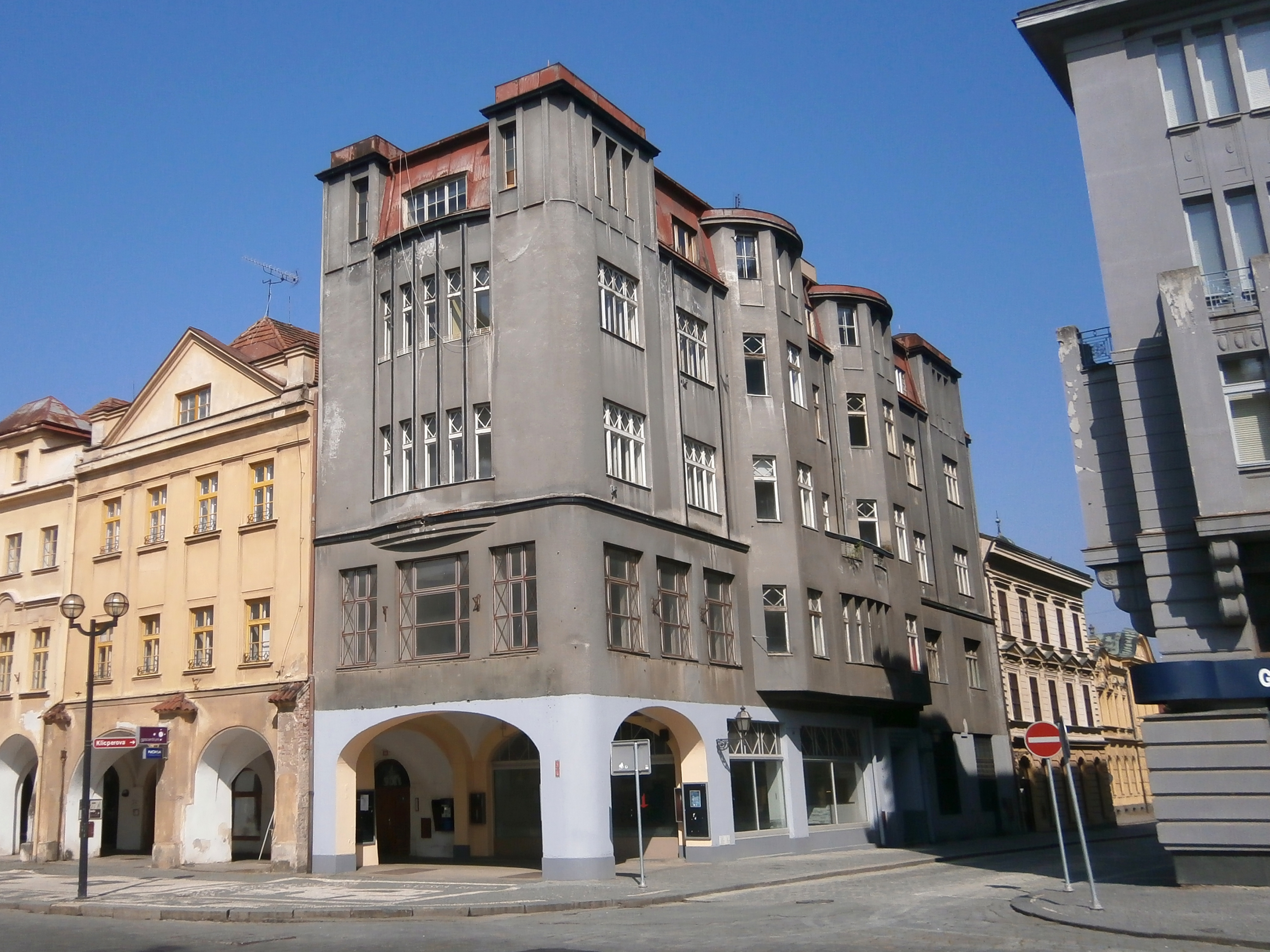 Špalkův obchodní dům z let 1910-1911 (Hradec Králové)